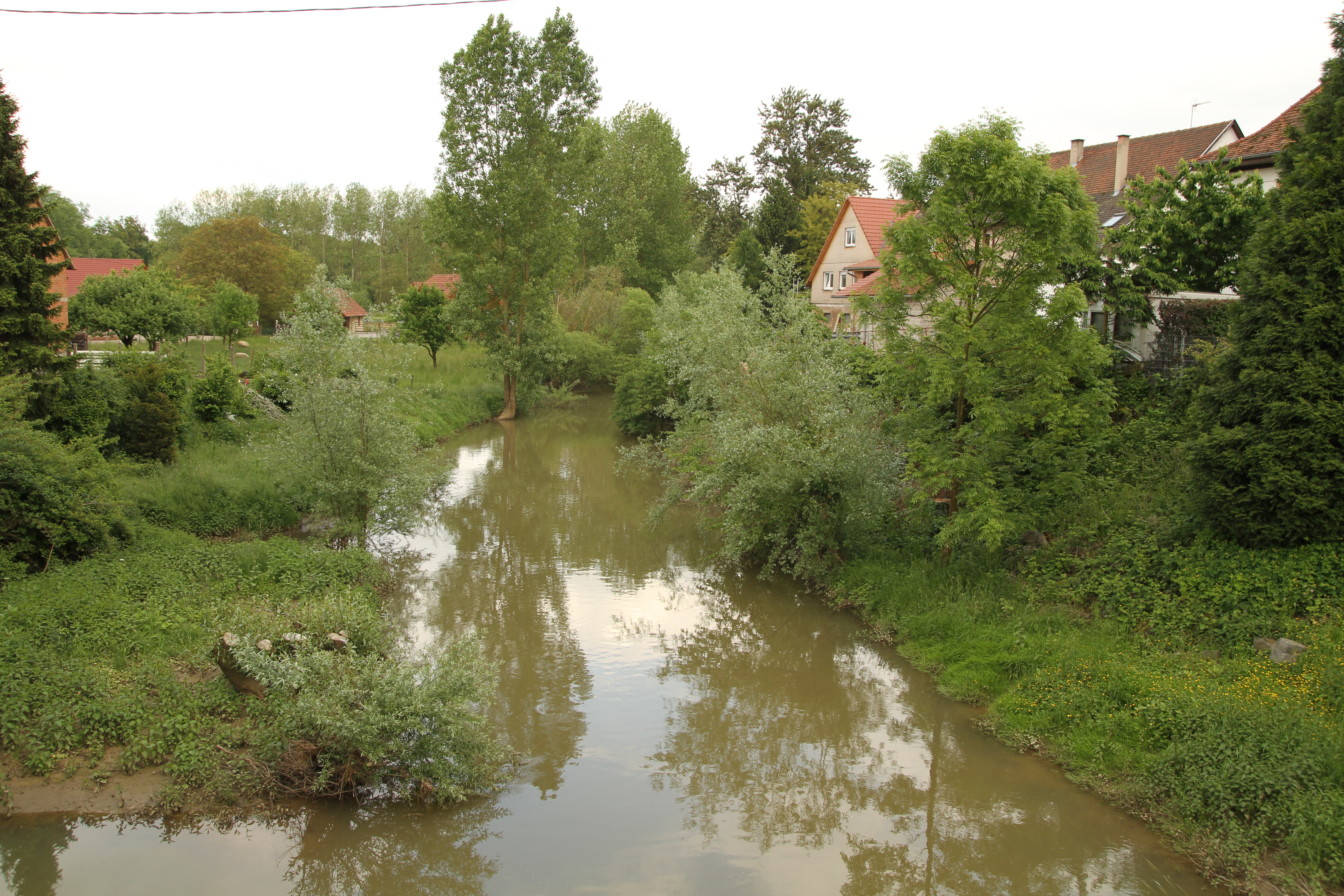 Der Seltzbach bei Seltz. Der Seltzbach ist ein gut 33 km langer linker Zufluss der Sauer im Elsass.